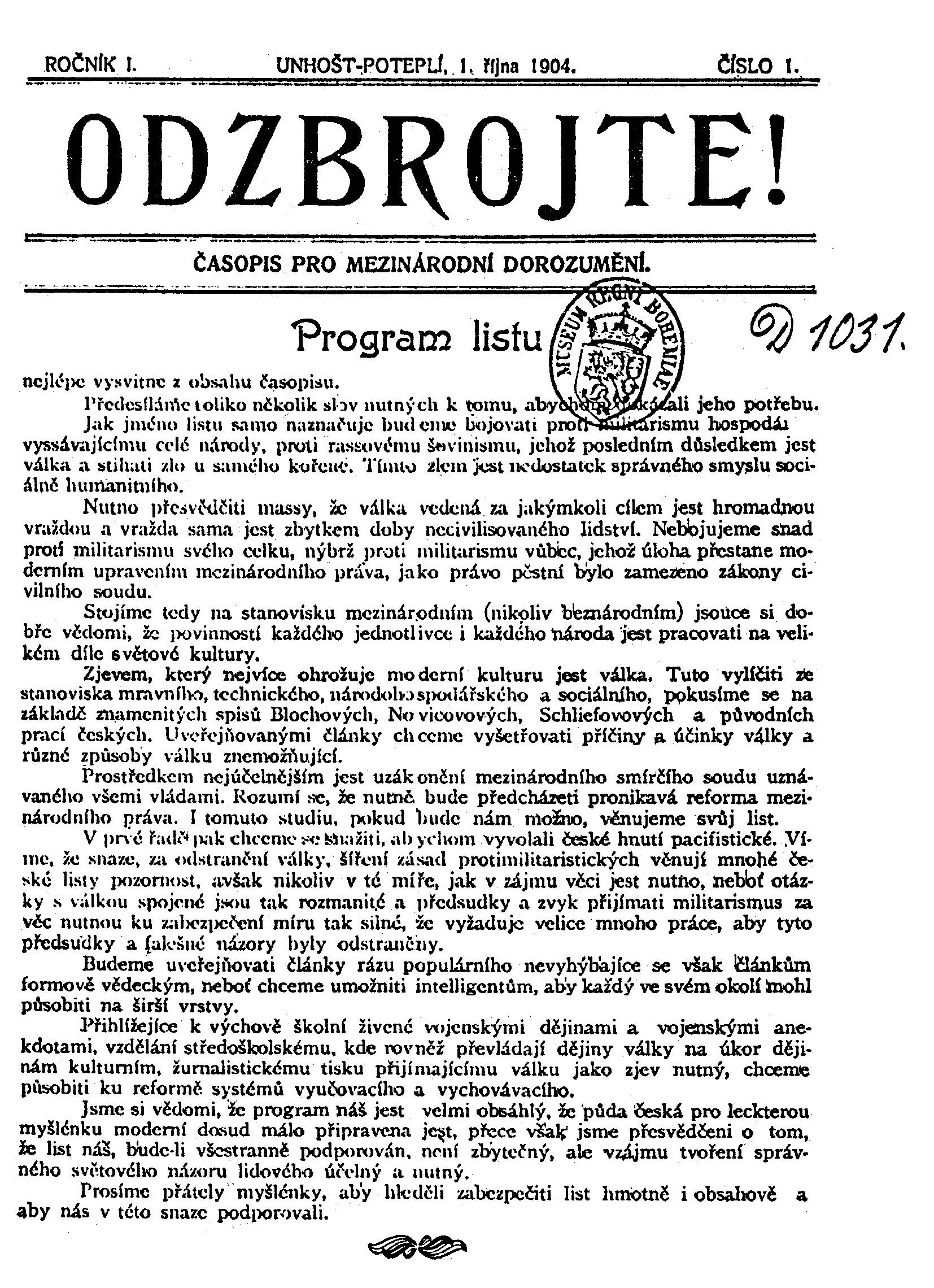 Úvodní číslo časopisu Odzbrojte! vydaného Bedřichem Frickem v Poteplí (dnes okres Kladno) v roce 1904